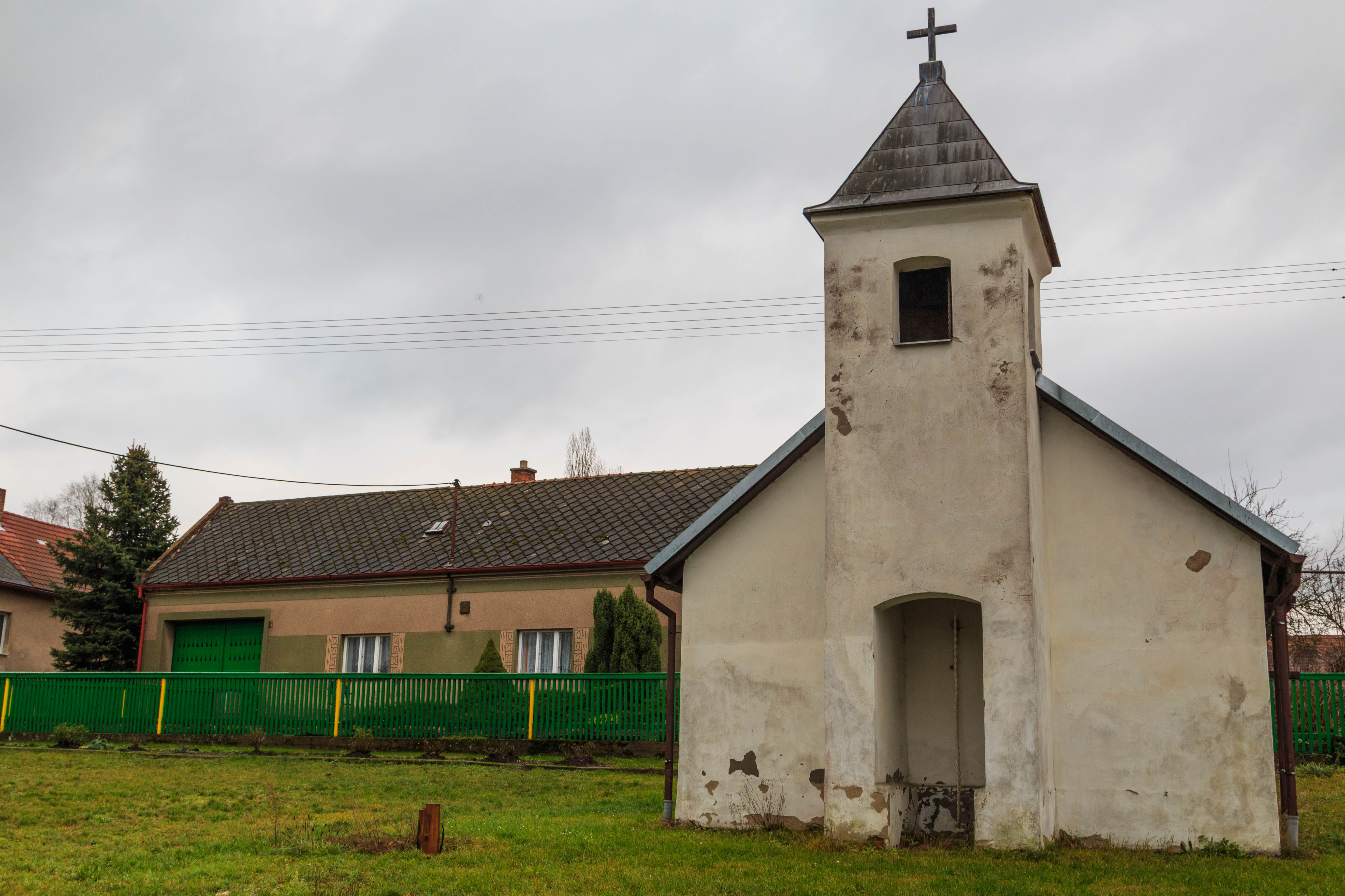 Chrtníč zvonička